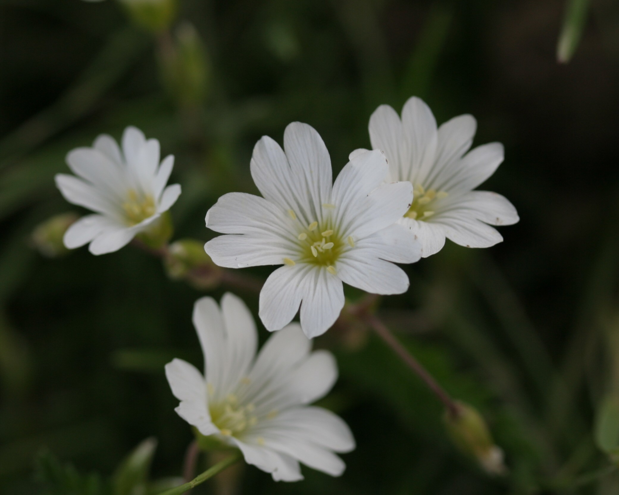 Cerastium arvense (Peverina a foglie strette)